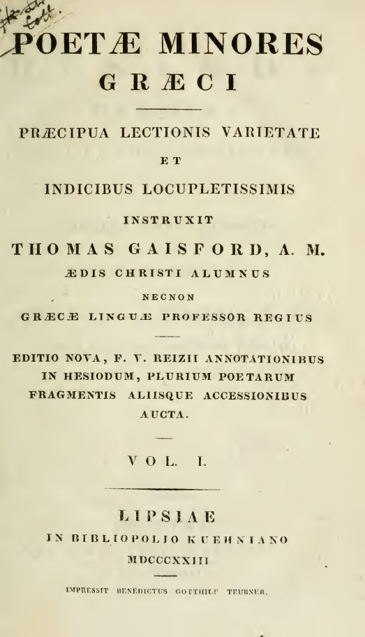 1: Hesiodi Carmina praecipua lectionis varietate et indicibus locuplentissimis instruxit Thomas Gaisford. - Lipsiae : in bibliopolio Kuehniano, 1823. - XIV, 290 p. . Frontespizio